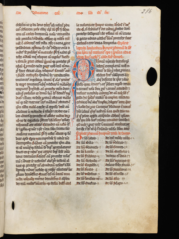 Cod. Eins. 629, Beispiel einer Fleuronnée-Initiale, F. 256r